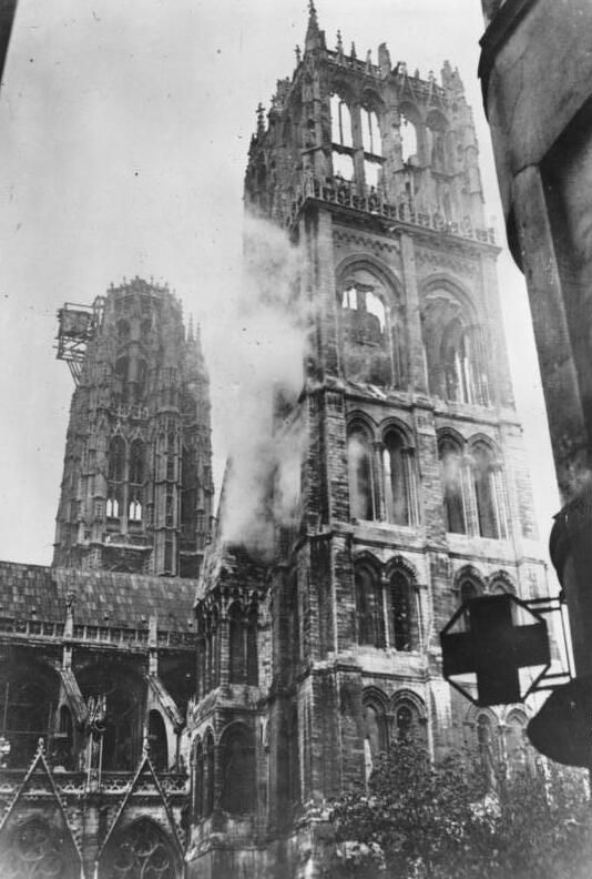 Die Kathedrale von Rouen zerstört. Die Kathedrale von Rouen nach dem letzten schweren anglo-amerikanischen Bombenangriff auf die Stadt. Dieses weltberühmte Bauwerk wurde durch Feuer vollständig zerstört, nachdem es schon früher durch Bombentreffer beschädigt worden war. 13.6.1944 A 6590